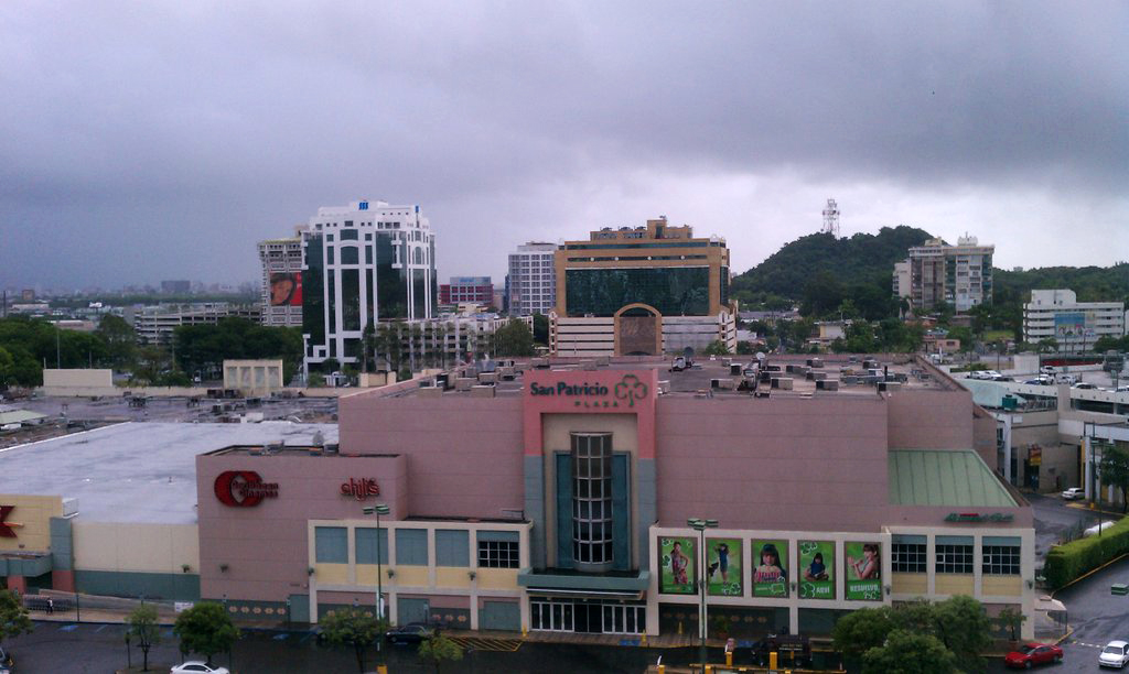 Asi esta el tiempo a las 8:40 esperando a la tormenta Emily.